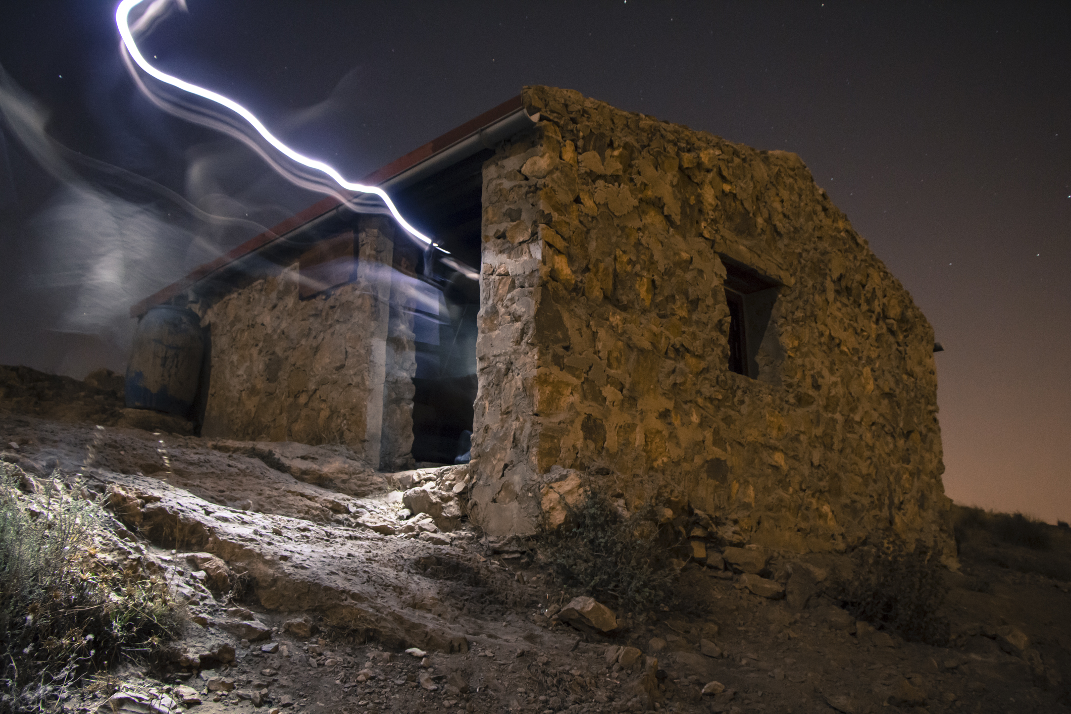 Sierra de Callosa de Segura This is a photography of a Special Area of Conservation in Spain with the ID: ES5213023. Natura2000 entry, EEA entry